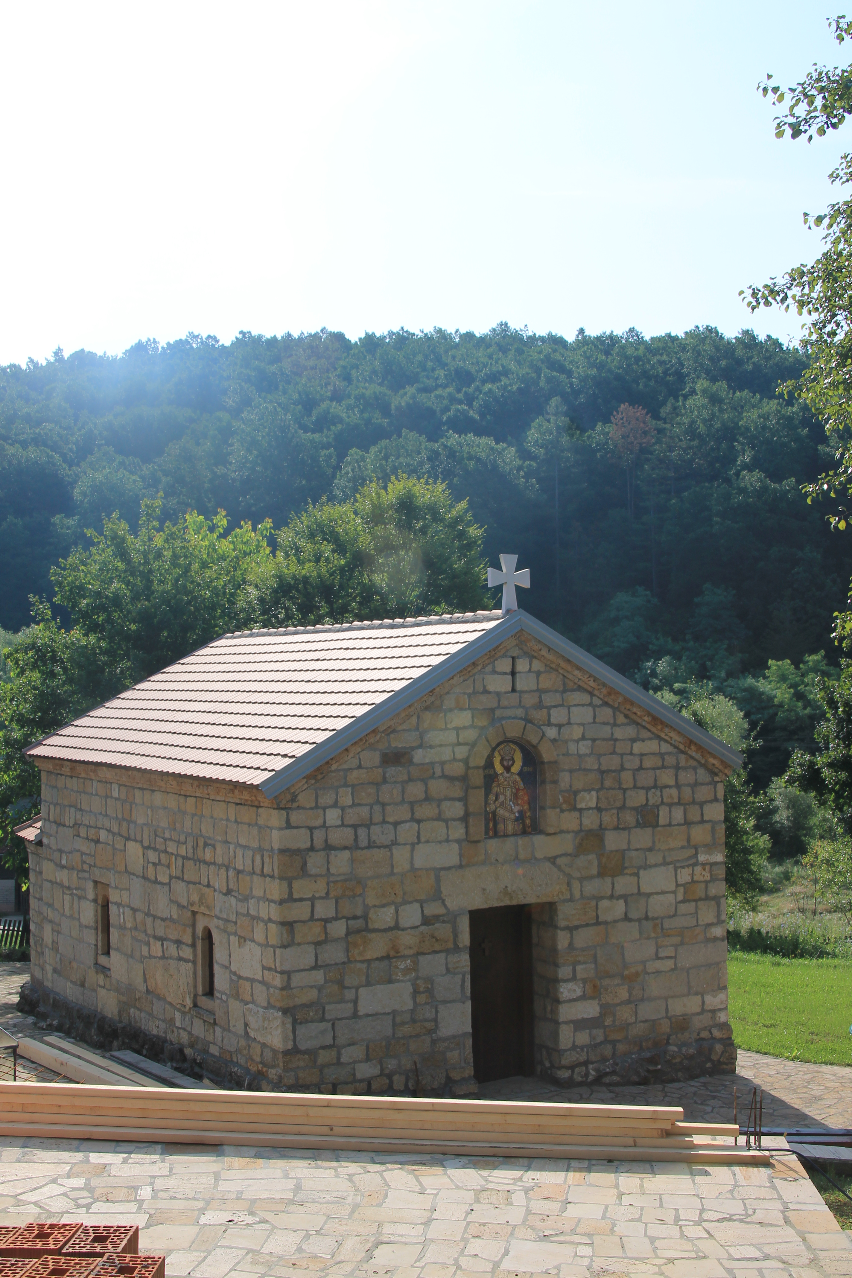 Crkva Sv. Despota Stefana Lazarevića (Babe)